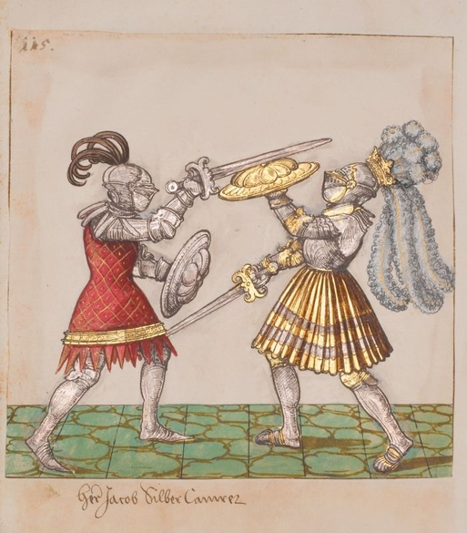 Seite aus dem Turnierbuch „Freydal“, KHM Wien, MS KK5073